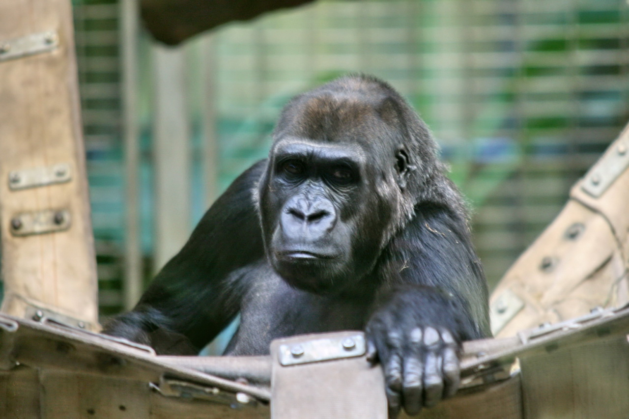 Western Lowland Gorila (Gorilla gorilla)